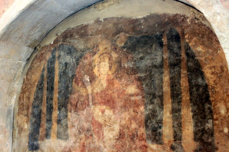 Affresco del XIII secolo, San Benedetto Vecchio in Padova.